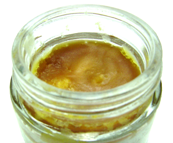 Das Bild zeigt das feste Labdanum-Harz, welches bereits gereinigt wurde und in dieser Form für die Parfumind. interessant ist. Ob und in wie weit dieser Rohstoff in den Herkunftsländern für med. Zwecke verwendet wird, kann ich nicht sagen. In Europa und Amerika wird das Harz häufig verräuchert. Dieses Harz stammt aus Indien.